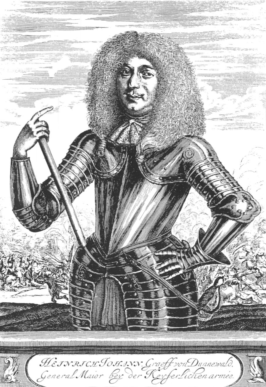 Johann Heinrich von Dünewald (1617-1691), österreichischer Generalfeldmarschall der Kavallerie Kupferstich, Blatt 242x170mm, Bild 222x154mm